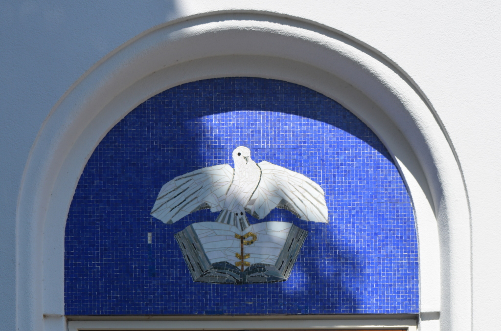 Snits, it Wite Tsjerkje, mozaiek boppe de tagong